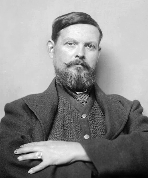 Frank Brangwyn, Welsh Artist Painter